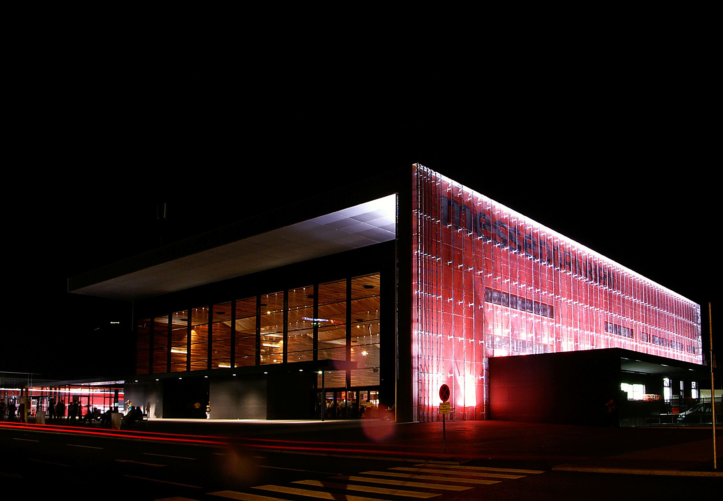 das “Wirtschaftszelt” der Dornbirner Messe im Schoren an der Autobahnausfahrt Dornbirn süd